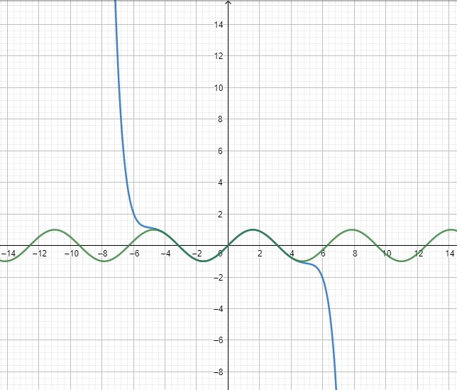 Fução sen(x) a verde e a azul função aproximada polinominal